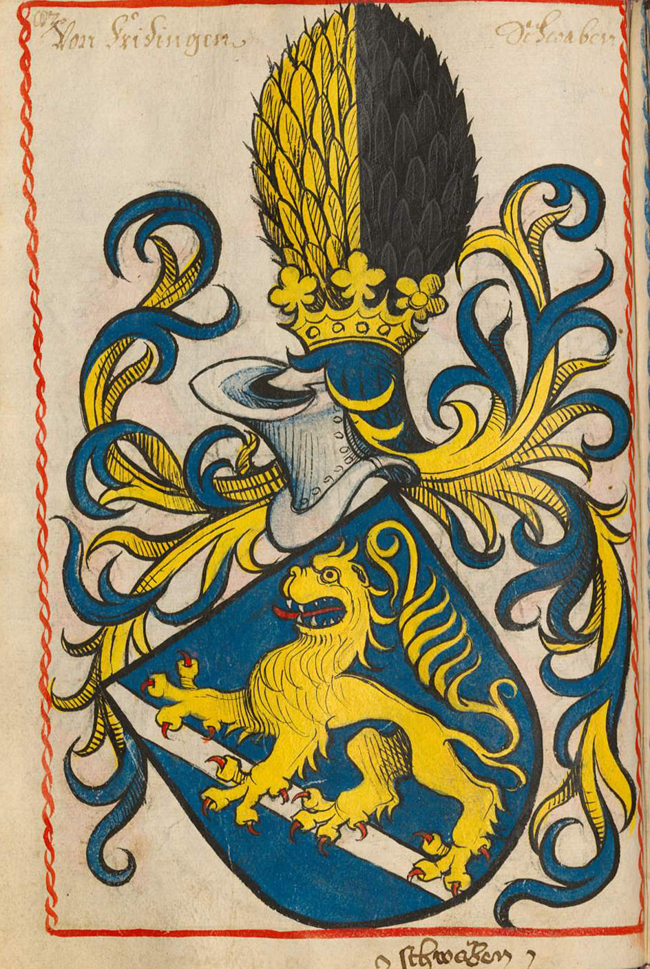 Scheibler'sches Wappenbuch, älterer Teil Fridingen